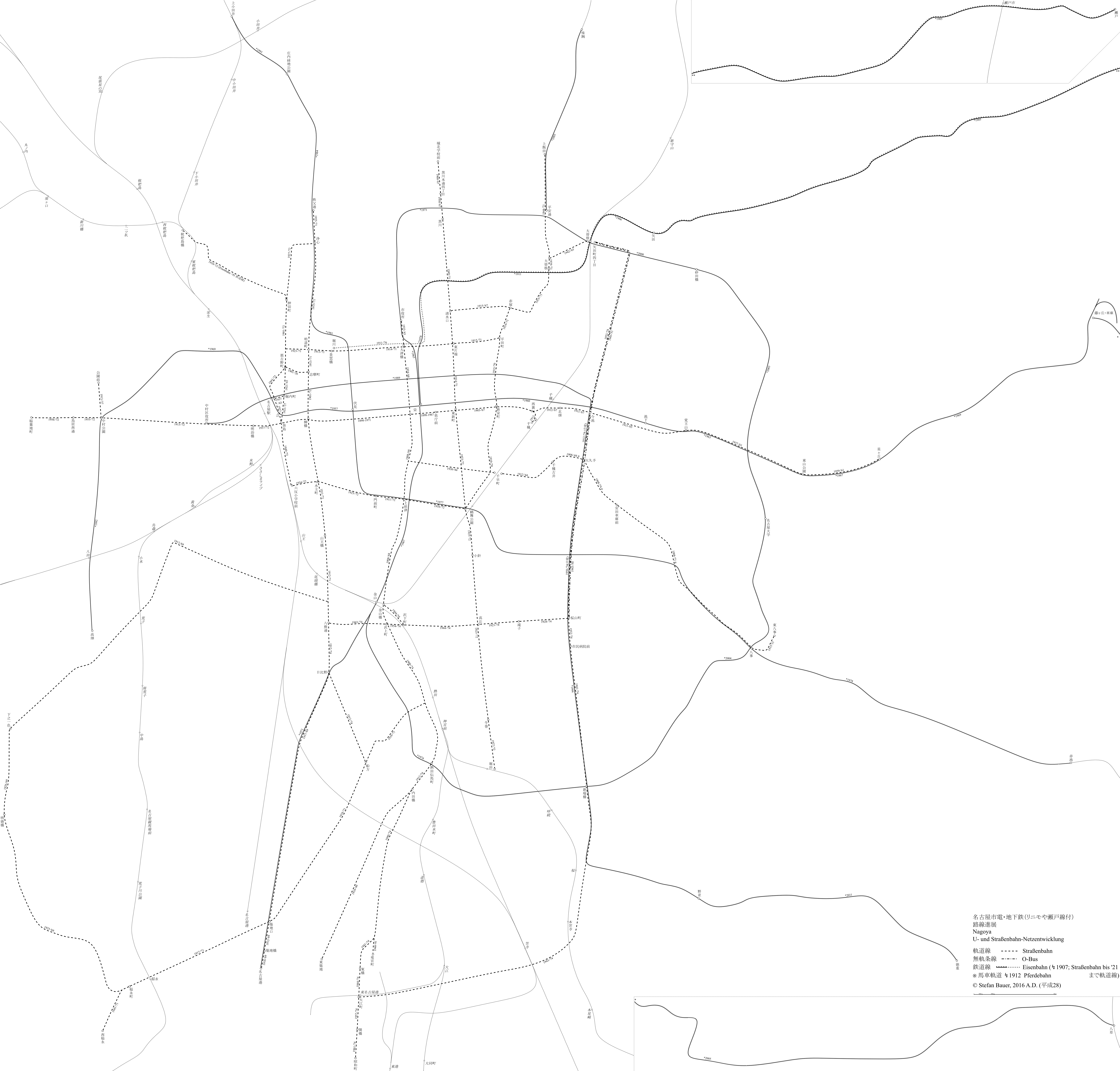 名古屋市の地下鉄と路面電車の路線進展図（リニモと瀬戸線付）